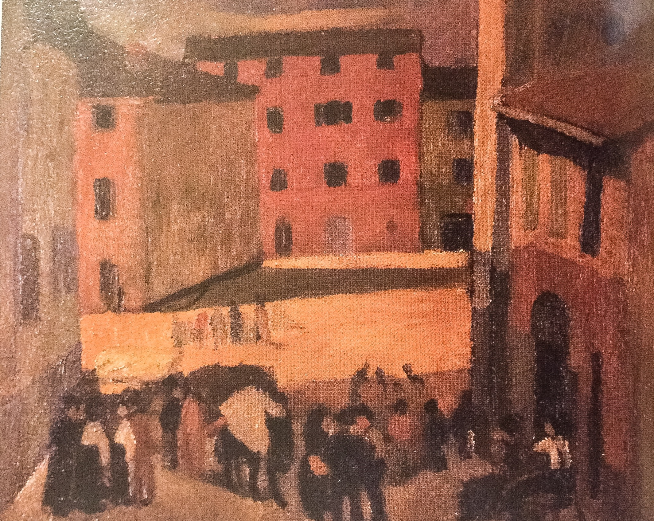 1916 Fondazione Montanelli-Bassi